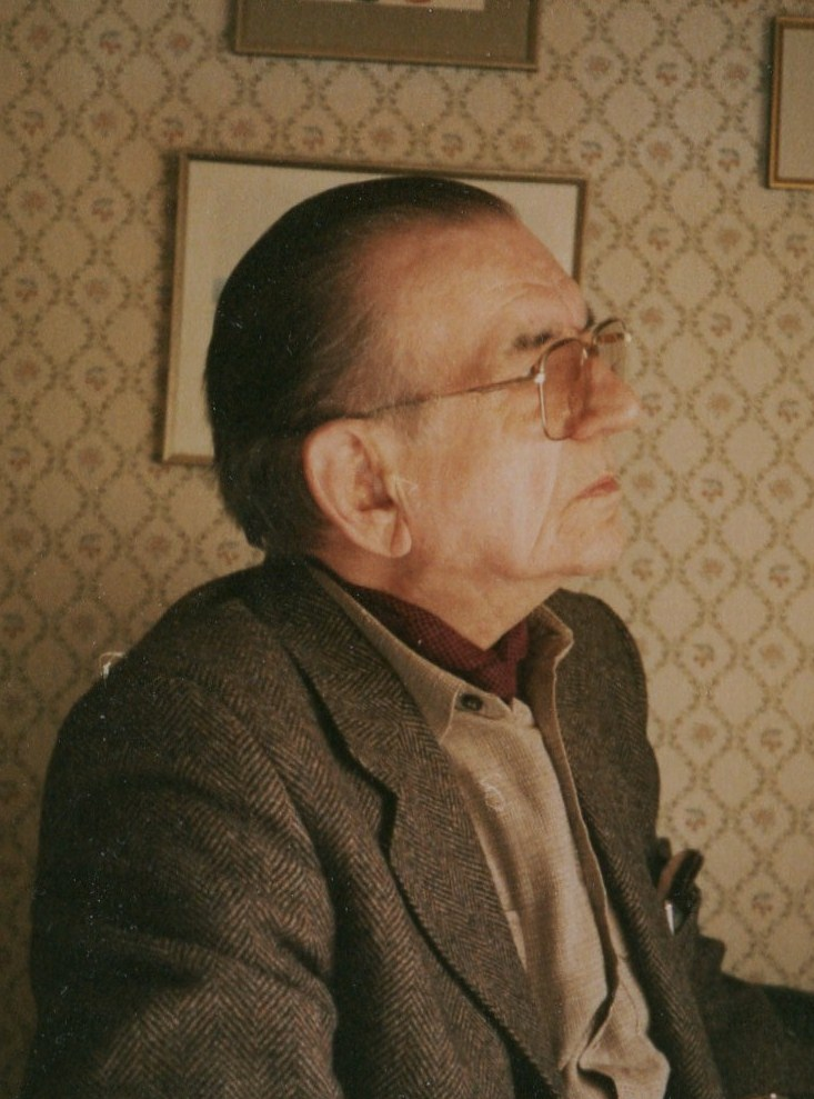 Porträt Hermann Stahl